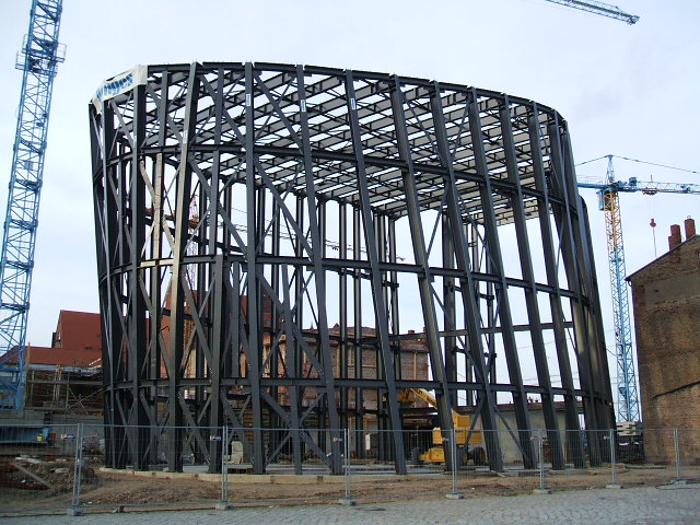 Das Foto zeigt die Baustelle für das Ozeaneum im März 2007.